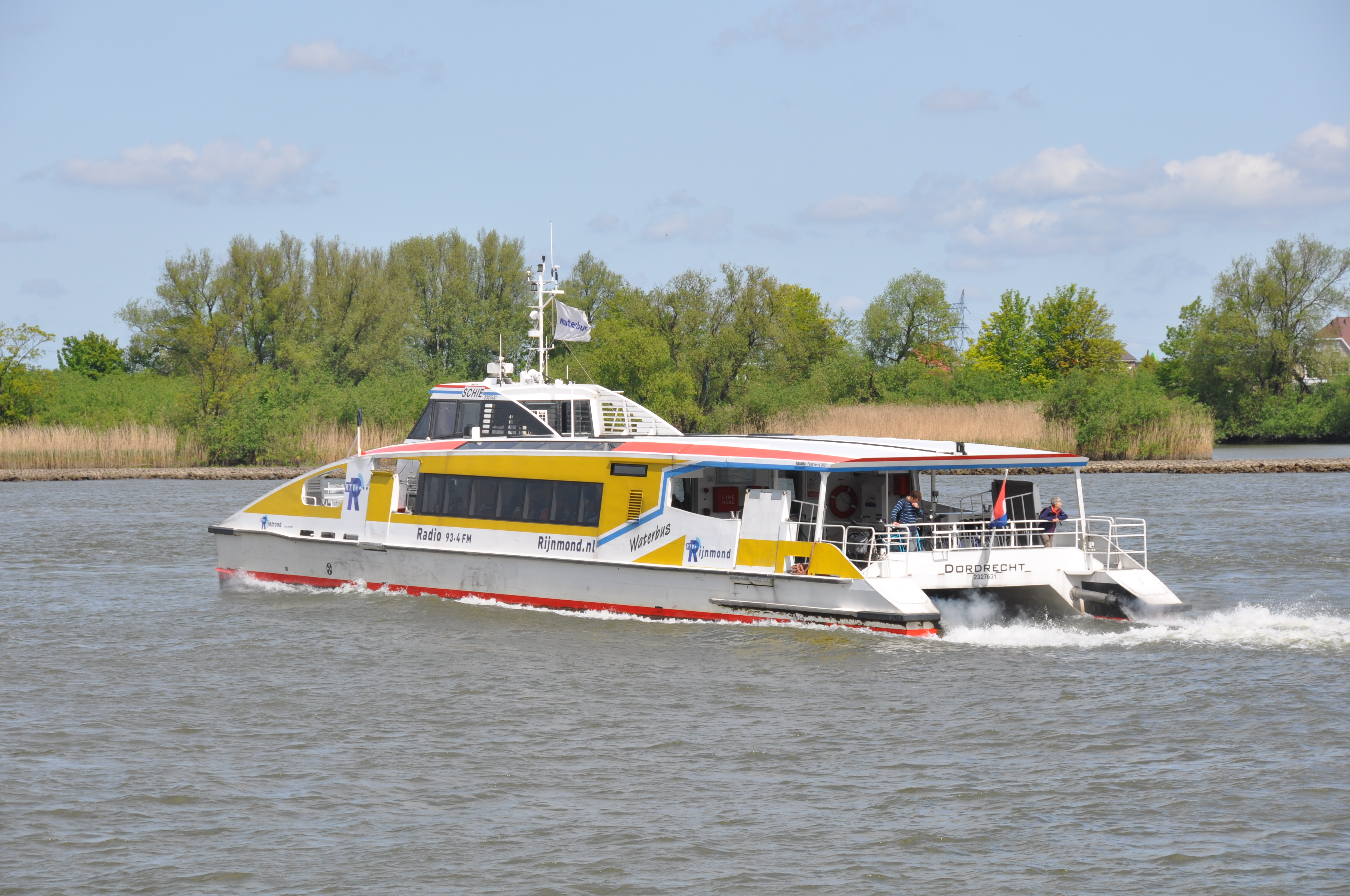 Waterbus SCHIE gaat in de afvaart op de Nieuwe Maas